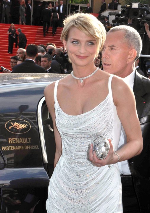 Sarah Marshall au festival de Cannes